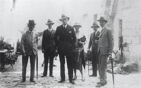 ירושלים - חברי ועדת החקירה , משמאל : סנלל, מוריס סיר בטרטון הגברת בטרטון , קוסט וסיר שאו